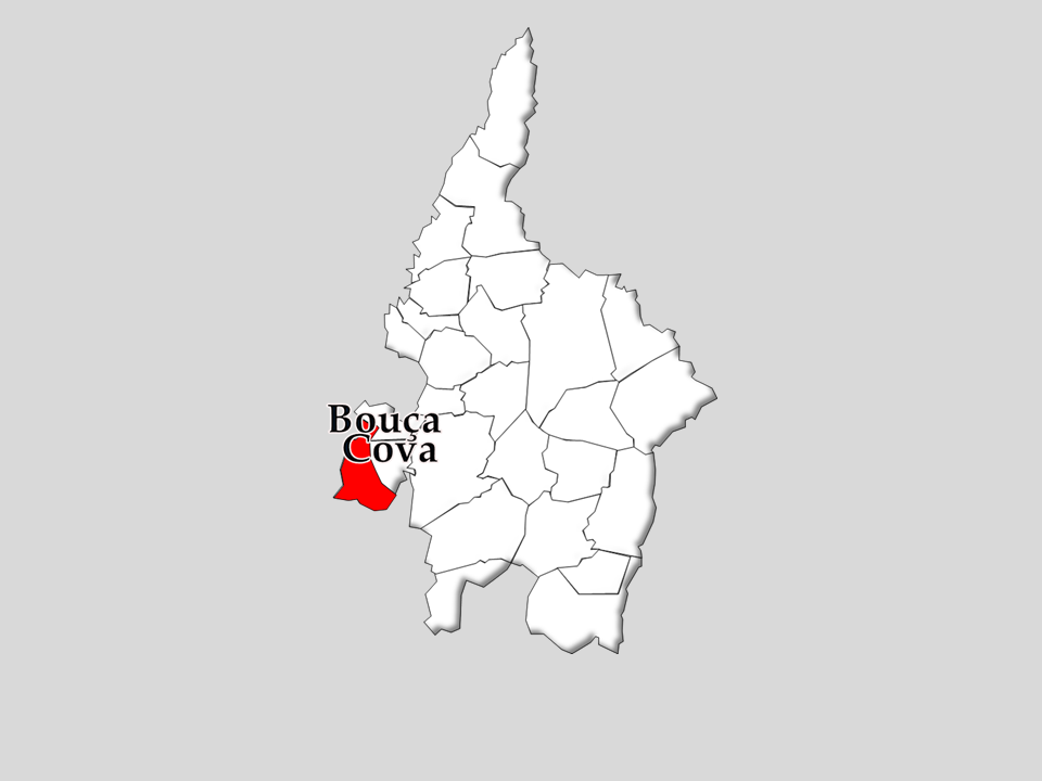 Censos 1864/2011